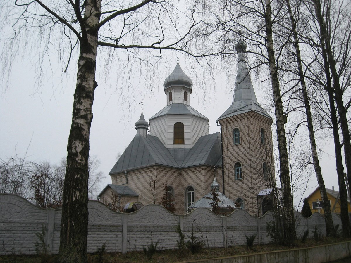 Лошніца. Царква Святога Архангела Міхаіла